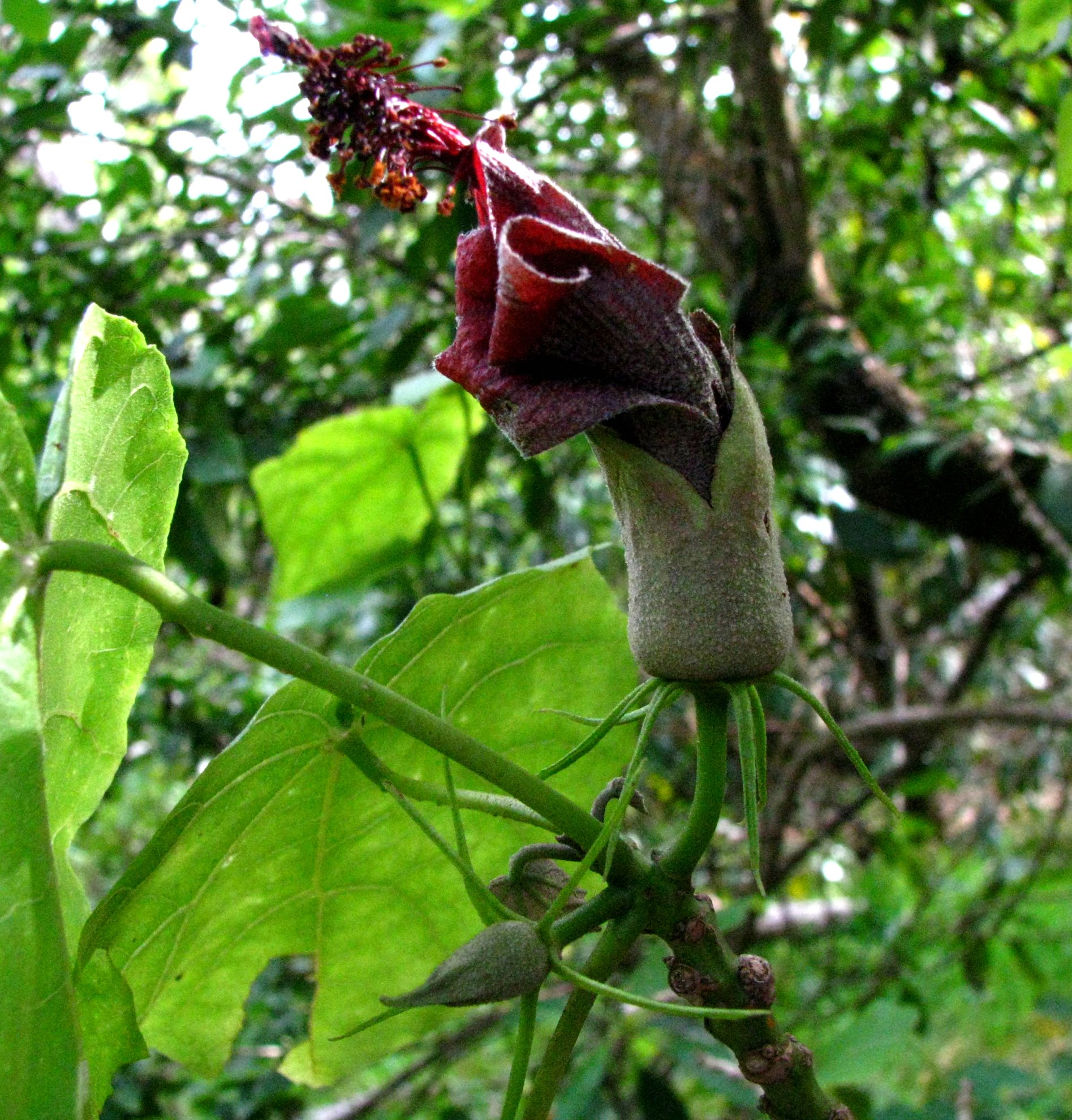 Hau kuahiwi or Kīlauea hau kuahiwi Malvaceae Endemic to the Hawaiian Islands (Hawaiʻi Island only) Endangered Kīpukapuala, Hawaiʻi Island